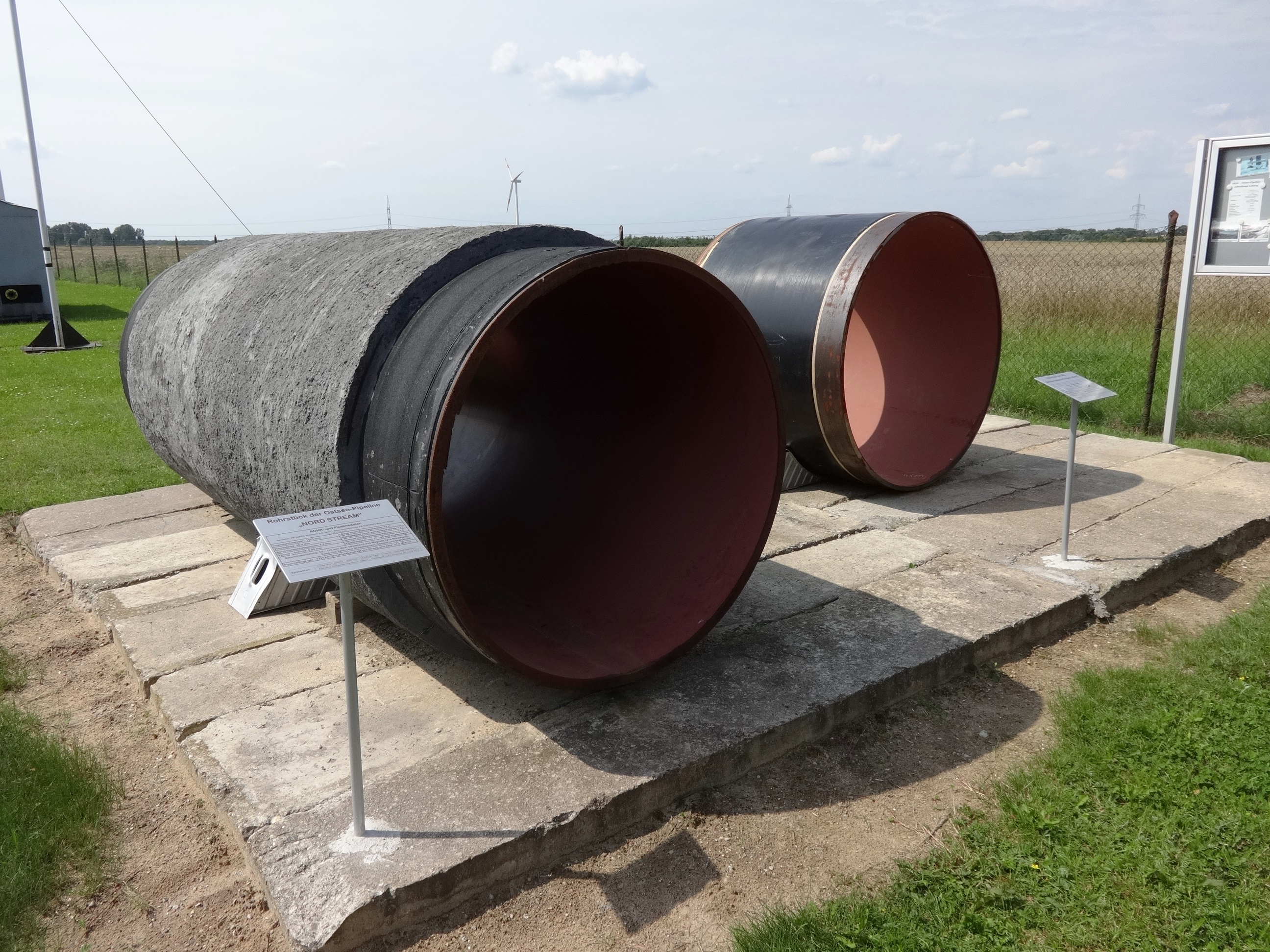 Erdölmuseum und Heimatstube in Reinkenhagen, Gemeinde Sundhagen in Mecklenburg-Vorpommern Der Raum um Grimmen und Reinkenhagen war von 1961 bis 1996 eines der größten norddeutschen Erdölfördergebiete auf dem Gebiet der DDR. Das Museum beschreibt die technischen Vorgänge, die Erdölförderung und ist am Standort der ersten erdölfündigen Bohrung Reinkenhagen 2/2a/60 eingerichtet. Eine Erdölstraße mit Exponaten führt von Miltzow aus zum Mueseum.